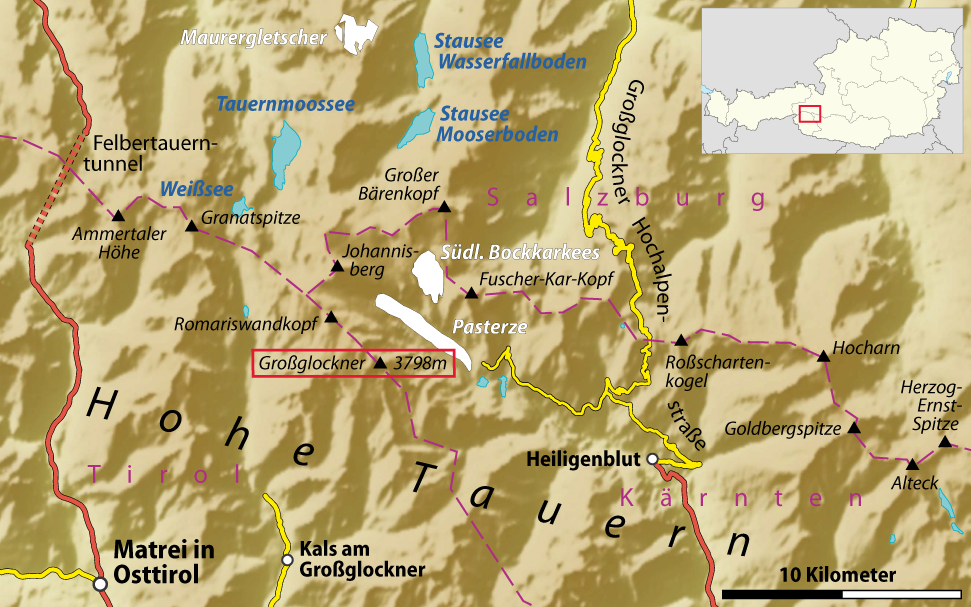 Umgebungskarte des Großglockners